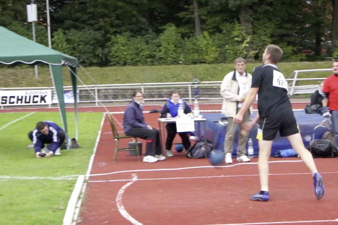 Friesentechnik Schleuderball. Abwurf.